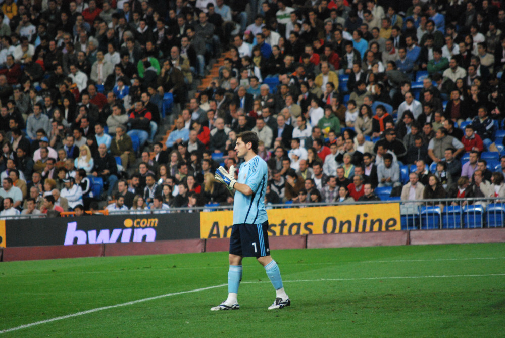 Real Madrid - Getafe